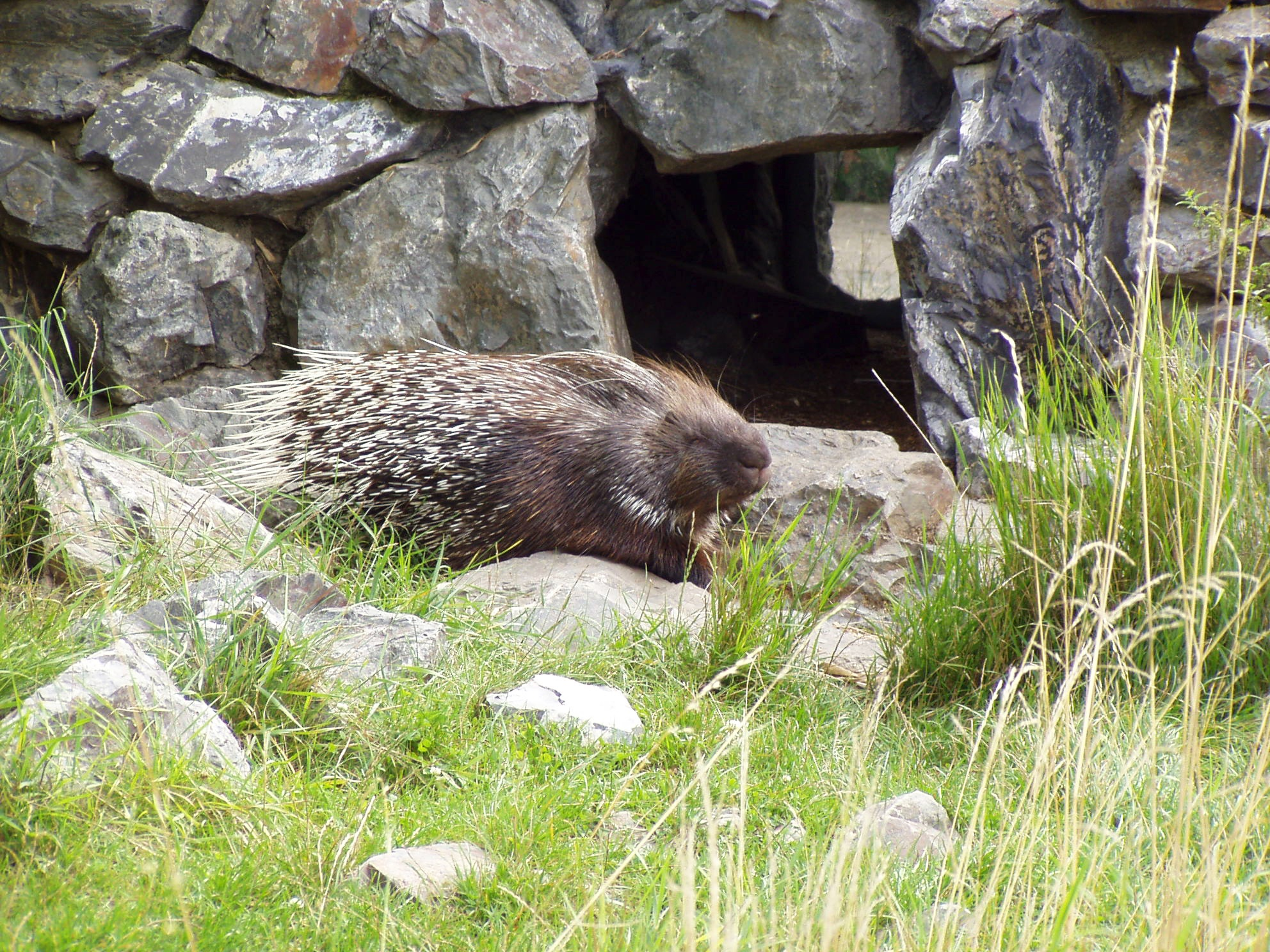 Hystrix indica (Prague Zoo)